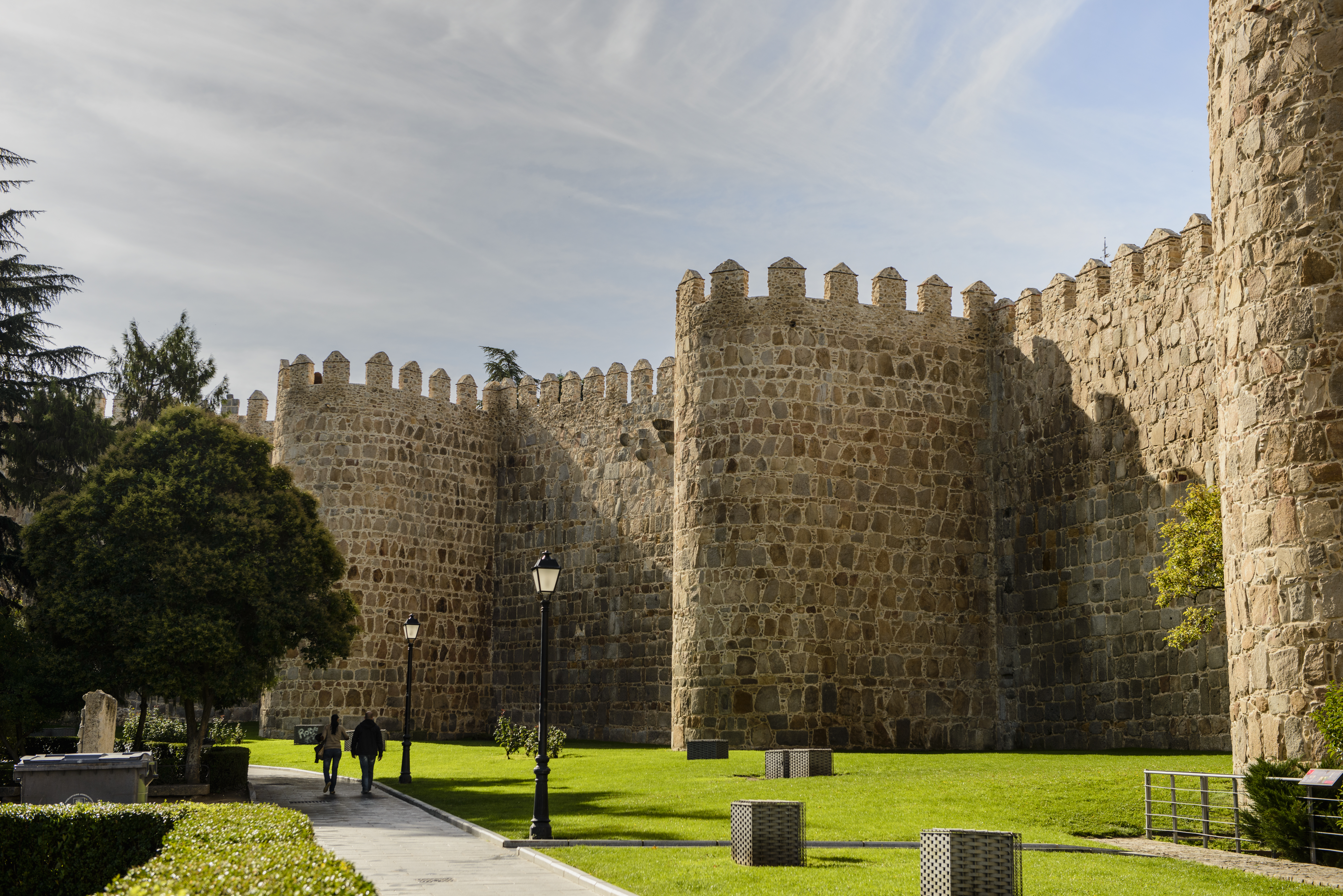 Murallas de Ávila, provincia de Ávila, Castilla y León, España.